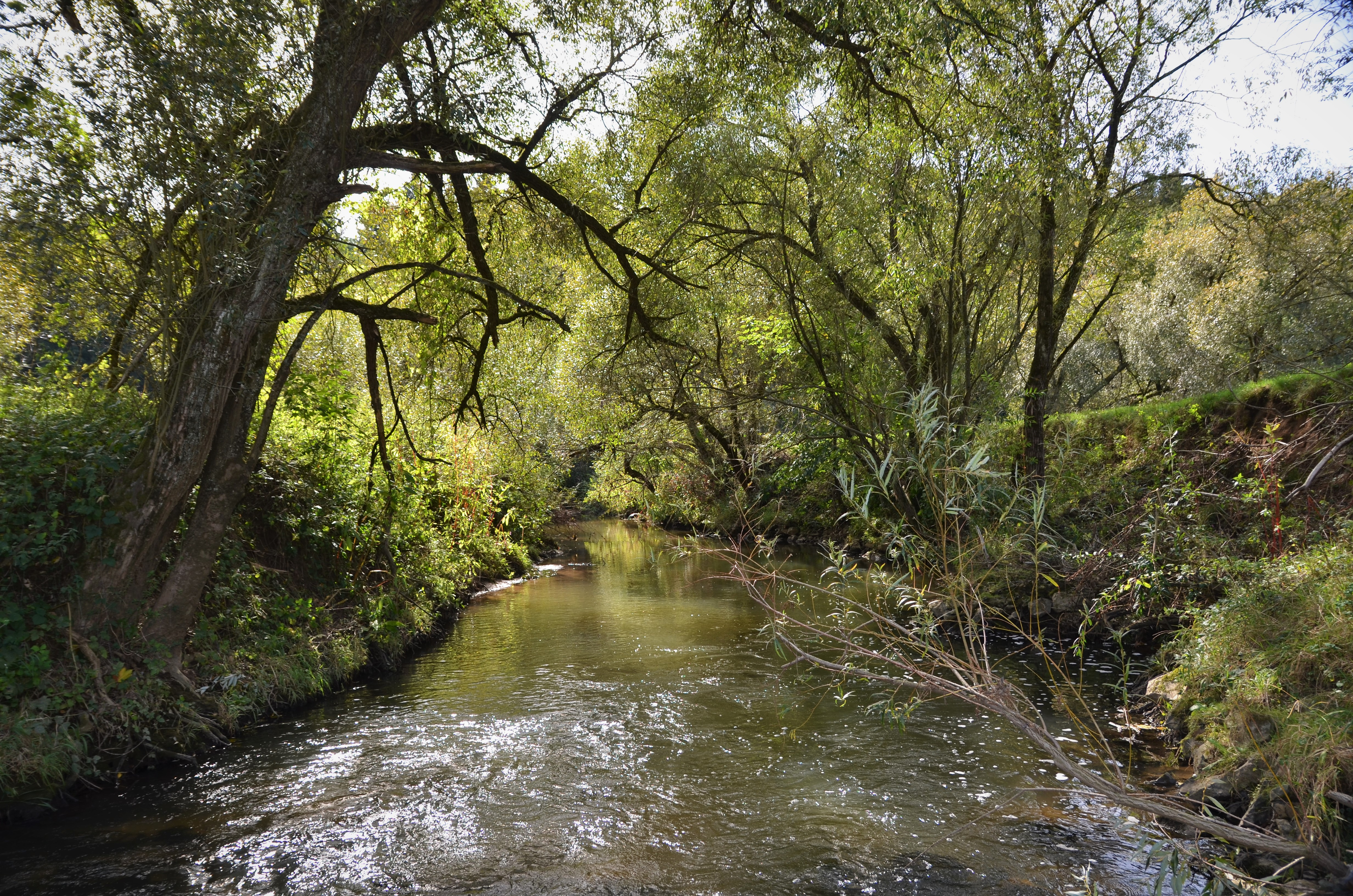 Schwarzach mit Galeriewald bestehend aus Weichholzauen nördlich von Burgthann, deutlich erkennbar sind die starken Seitenerosionsprozesse